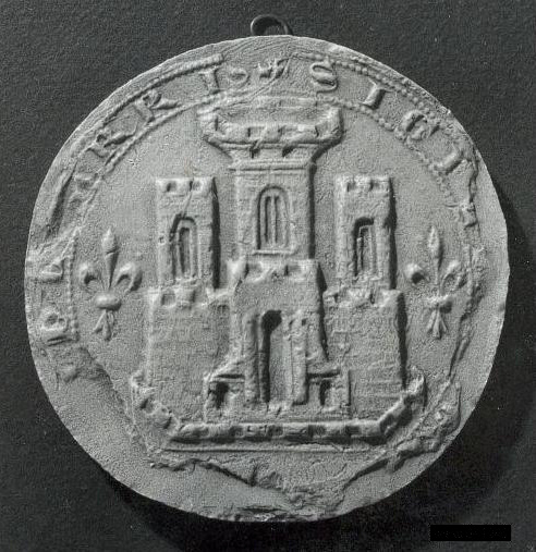 Contre-sceau de Guillaume III des Barres